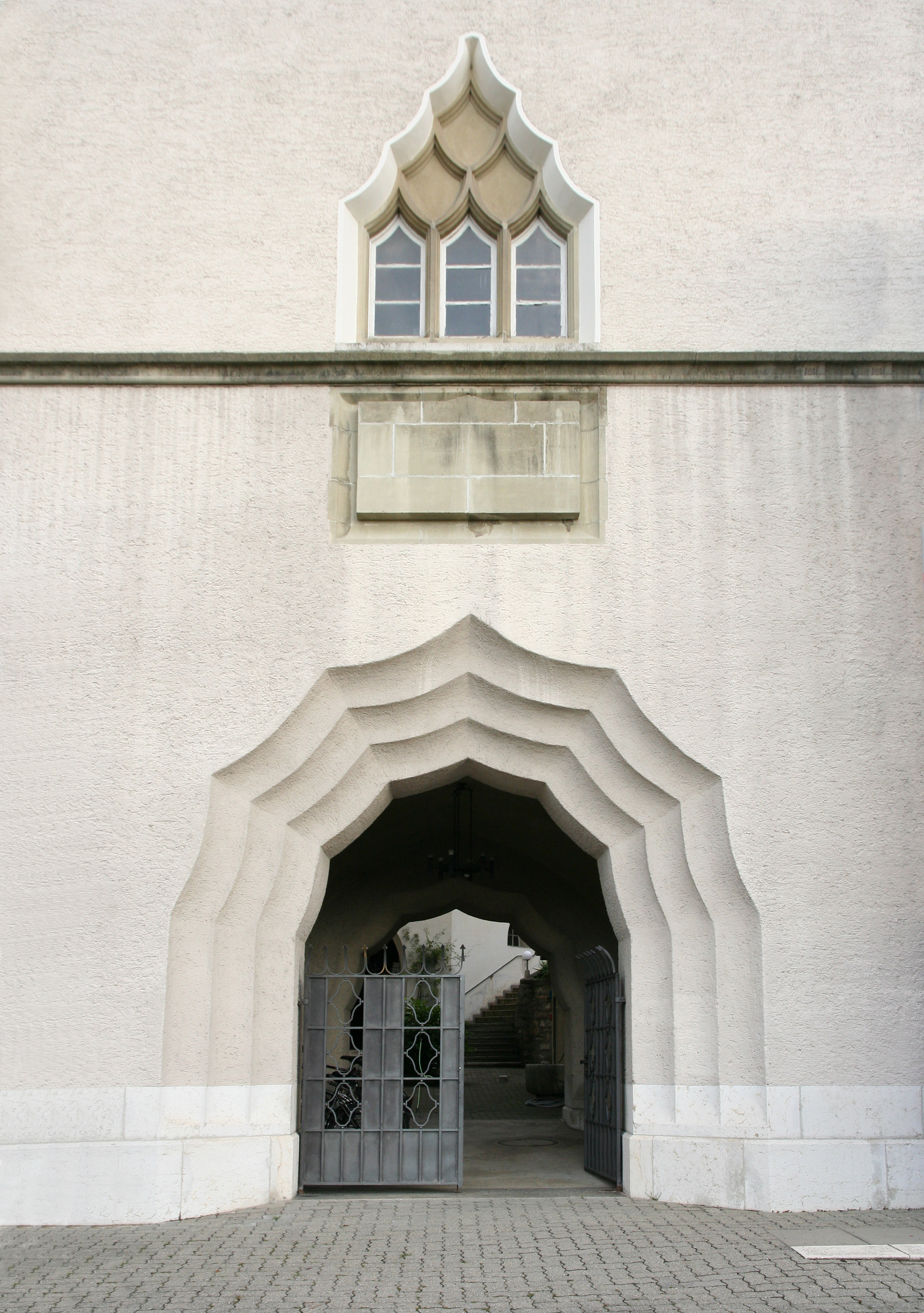 Römisch-katholische Kirche St. Maria Biel/Bienne, expressionistischer Torbogen